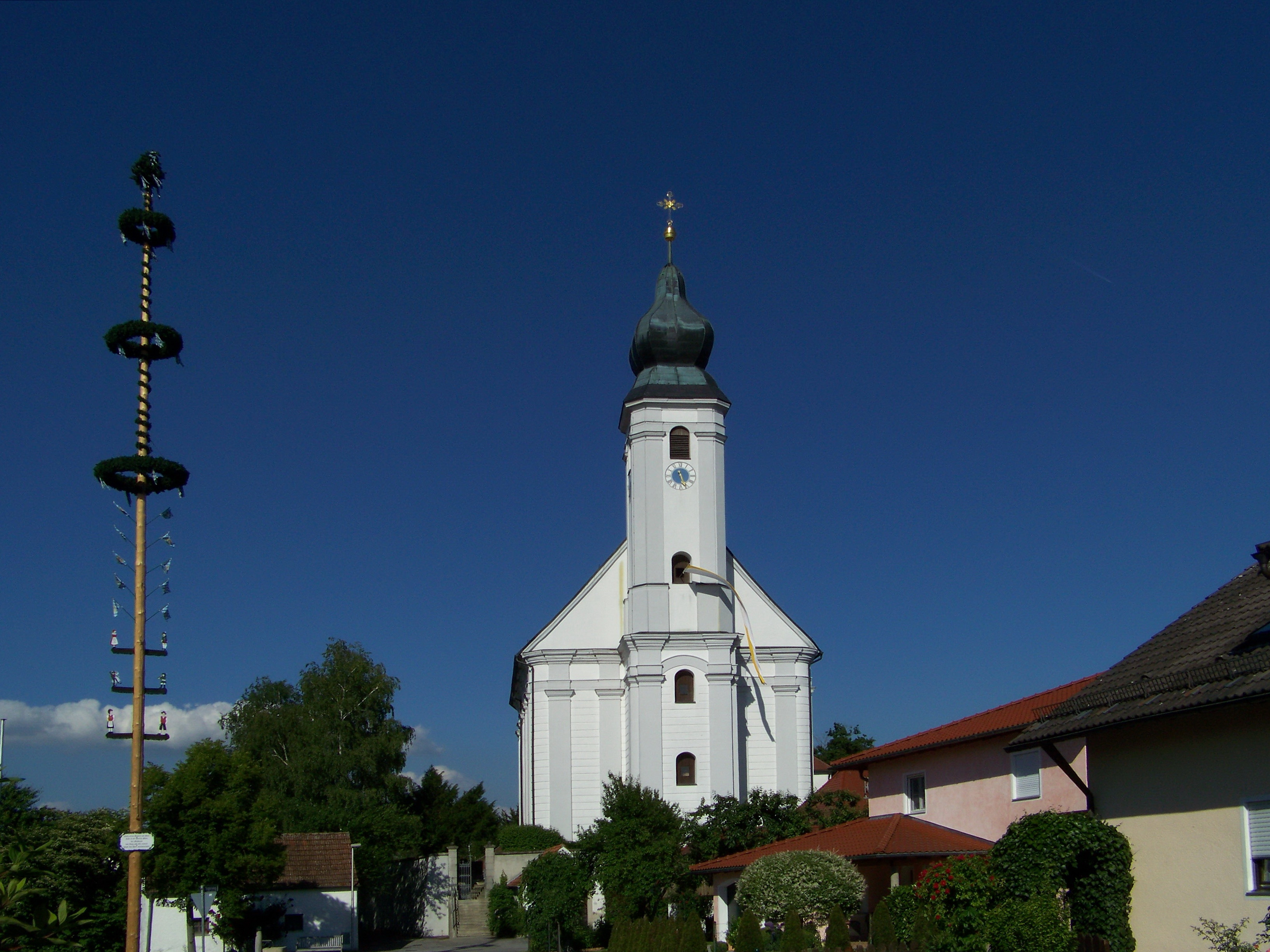 Deggendorf, Rettenbach, Kirchenstraße 4. Katholische Filialkirche Mariä Heimsuchung. barocker, ausgerundeter Saalraum mit querovalem Chor und Westturm, von Georg Felix Hirschstötter d. J., 1754–58; mit Ausstattung; Friedhofsmauer, wohl 18. Jahrhundert.